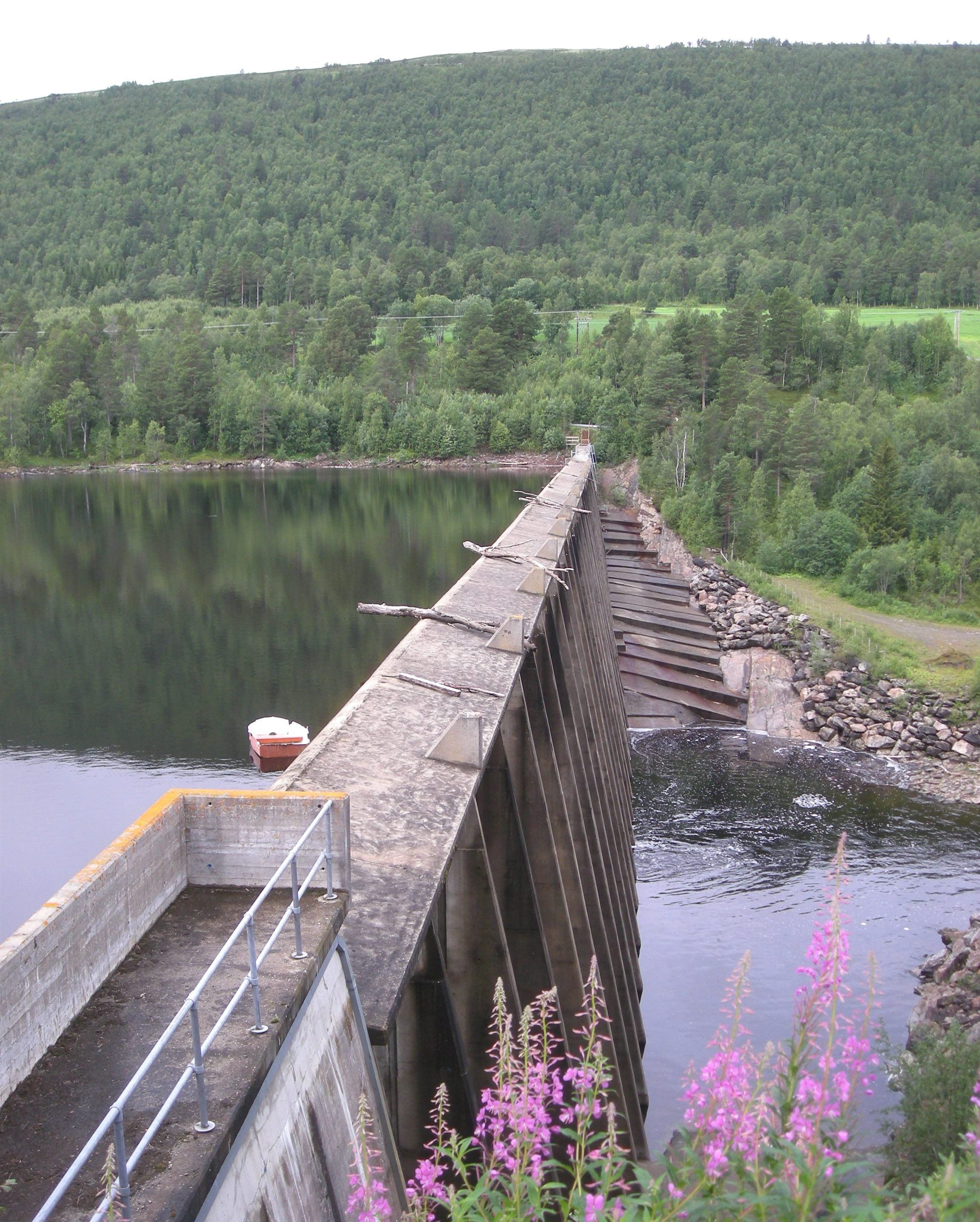 Storfossdammen i Orkla (Tynset kommune) er inntaksdam for Brattset kraftverk et godt stykke lenger ned.